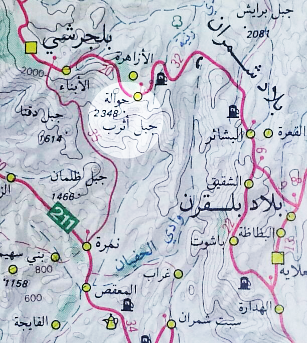 موقع بلاد حوالة بين المناطق